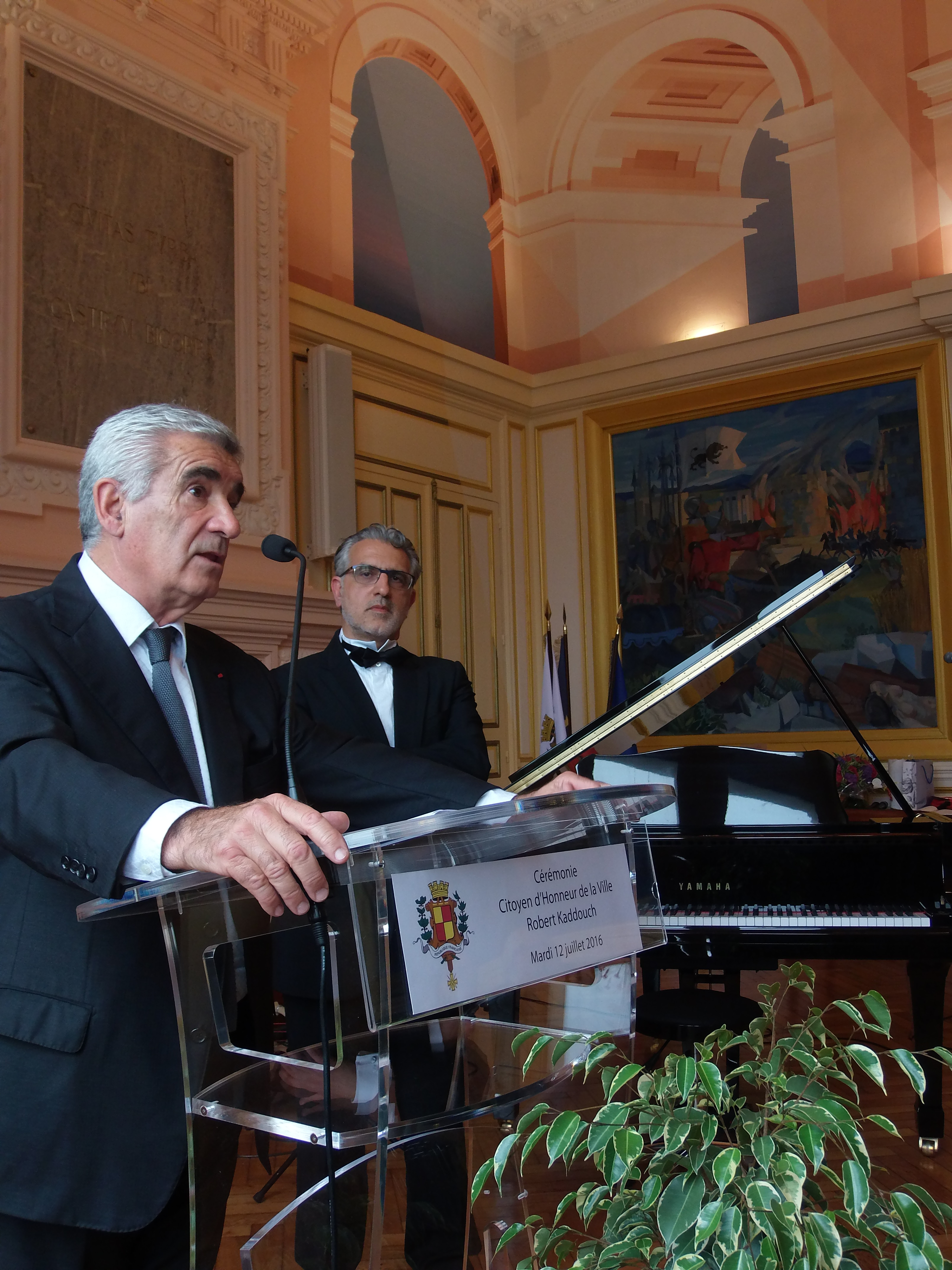 Gérard Trémège, Maire de Tarbes, déclare Robert Kaddouch, citoyen d'honneur de la ville de Tarbes. Mardi 12 Juillet 2016